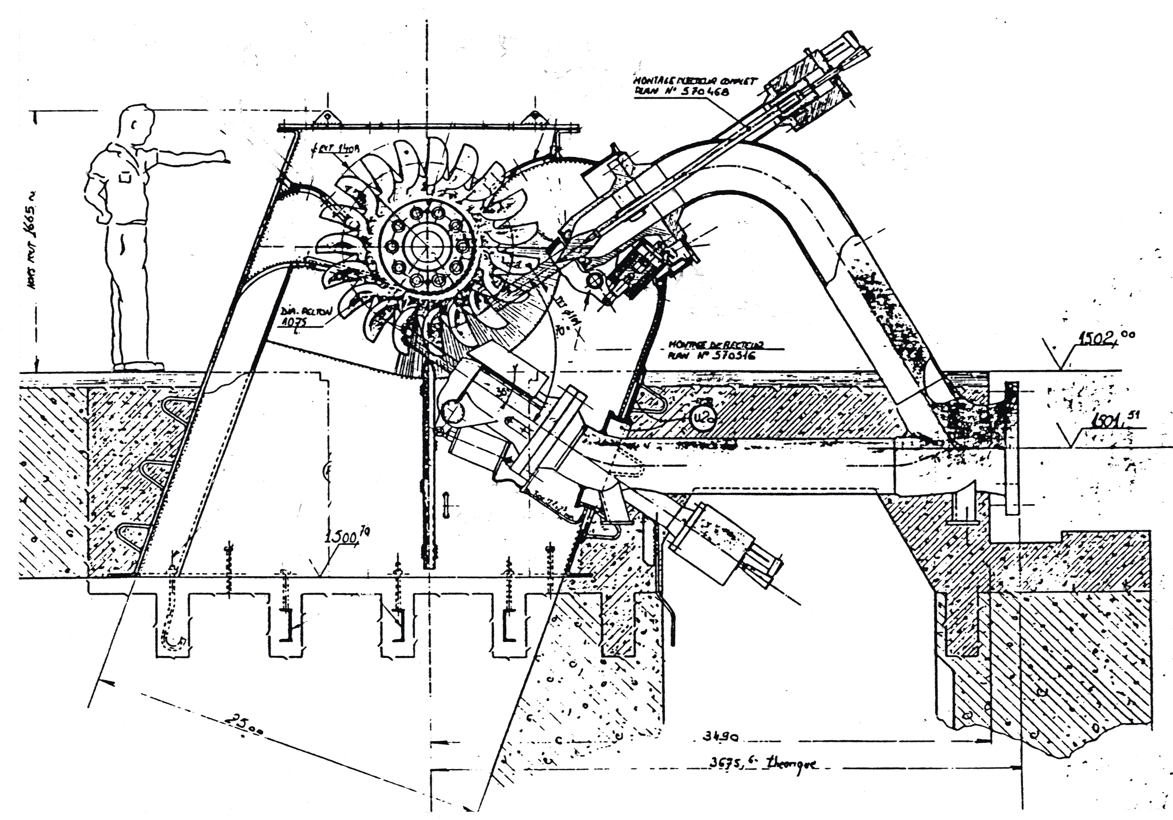 Coupe d'une turbine Pelton